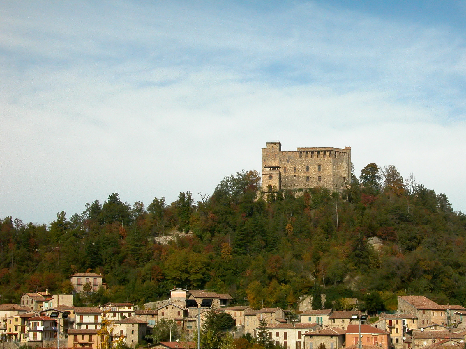 Zavattarello Castle, Italy